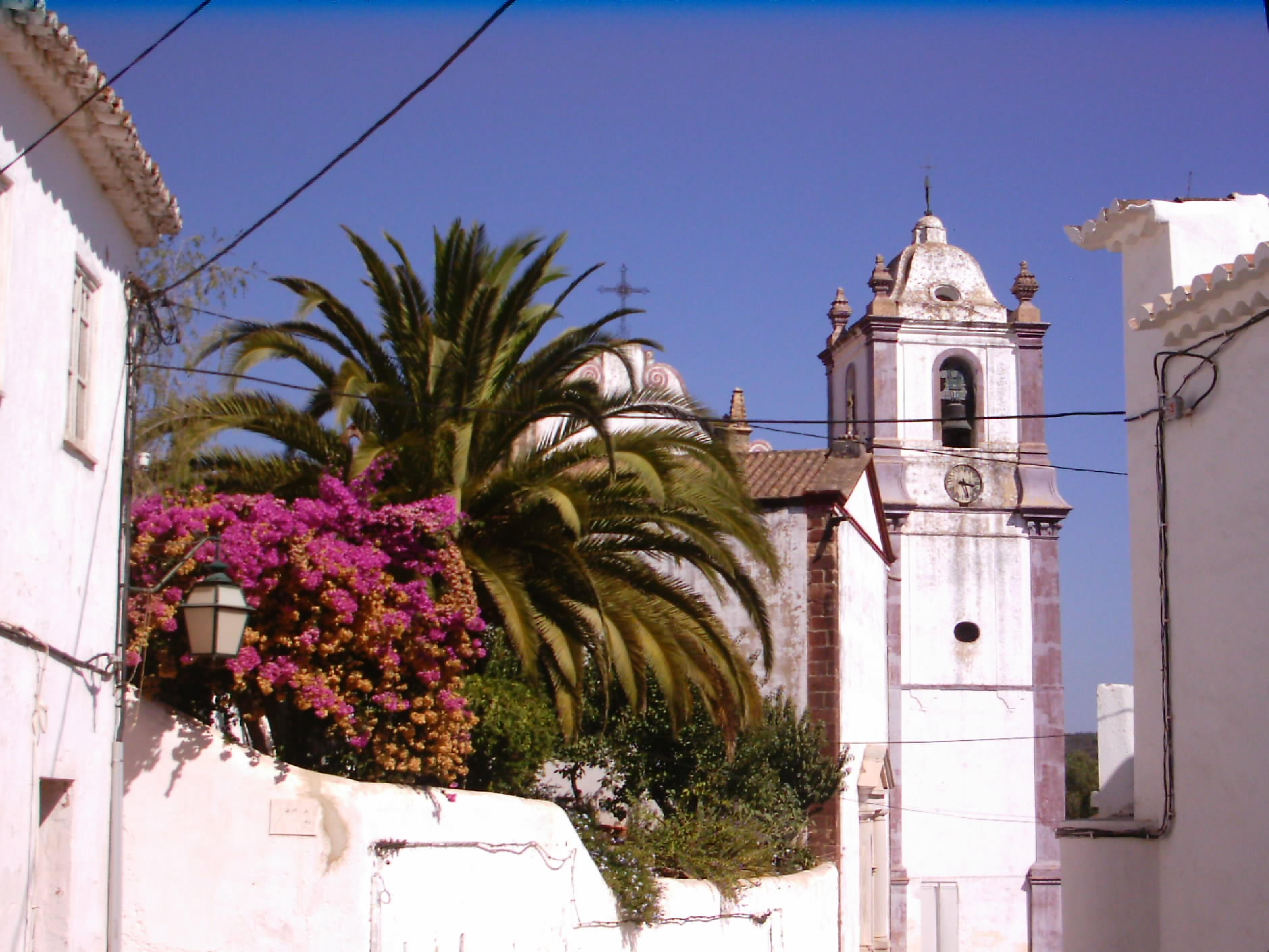 Vista com a Sé Catedral de Silves ao fundo. Silves, Portugal.